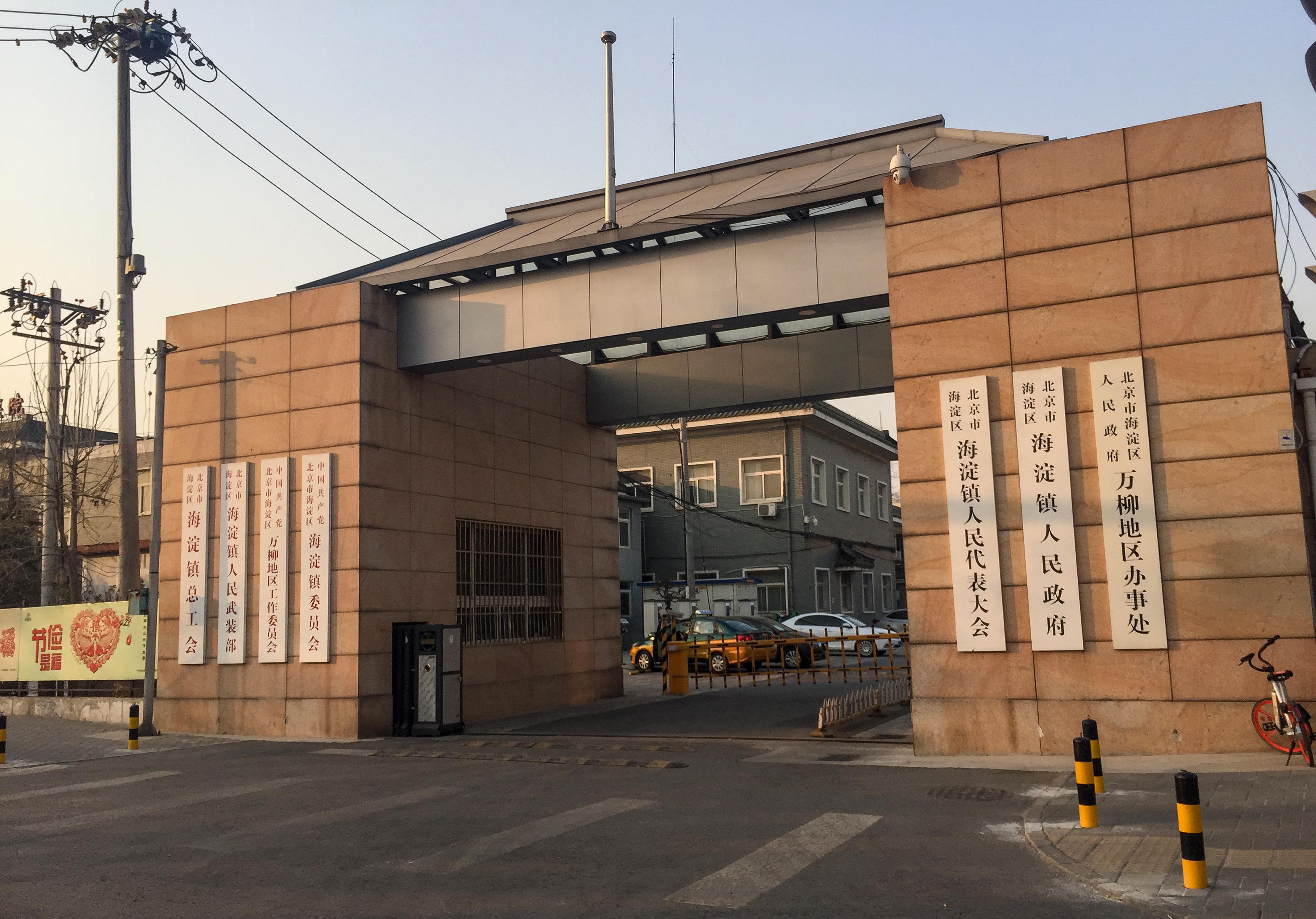 海淀镇政府、万柳地区办事处